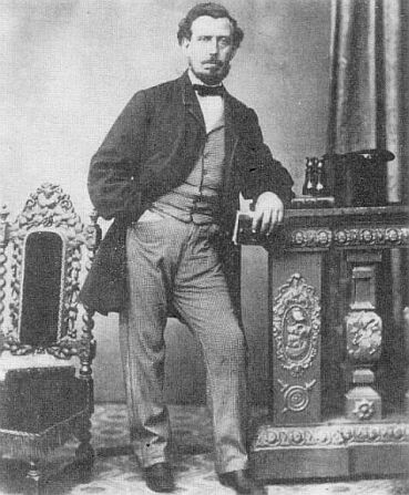 Stephan Jantzen vor dem Jahr 1870